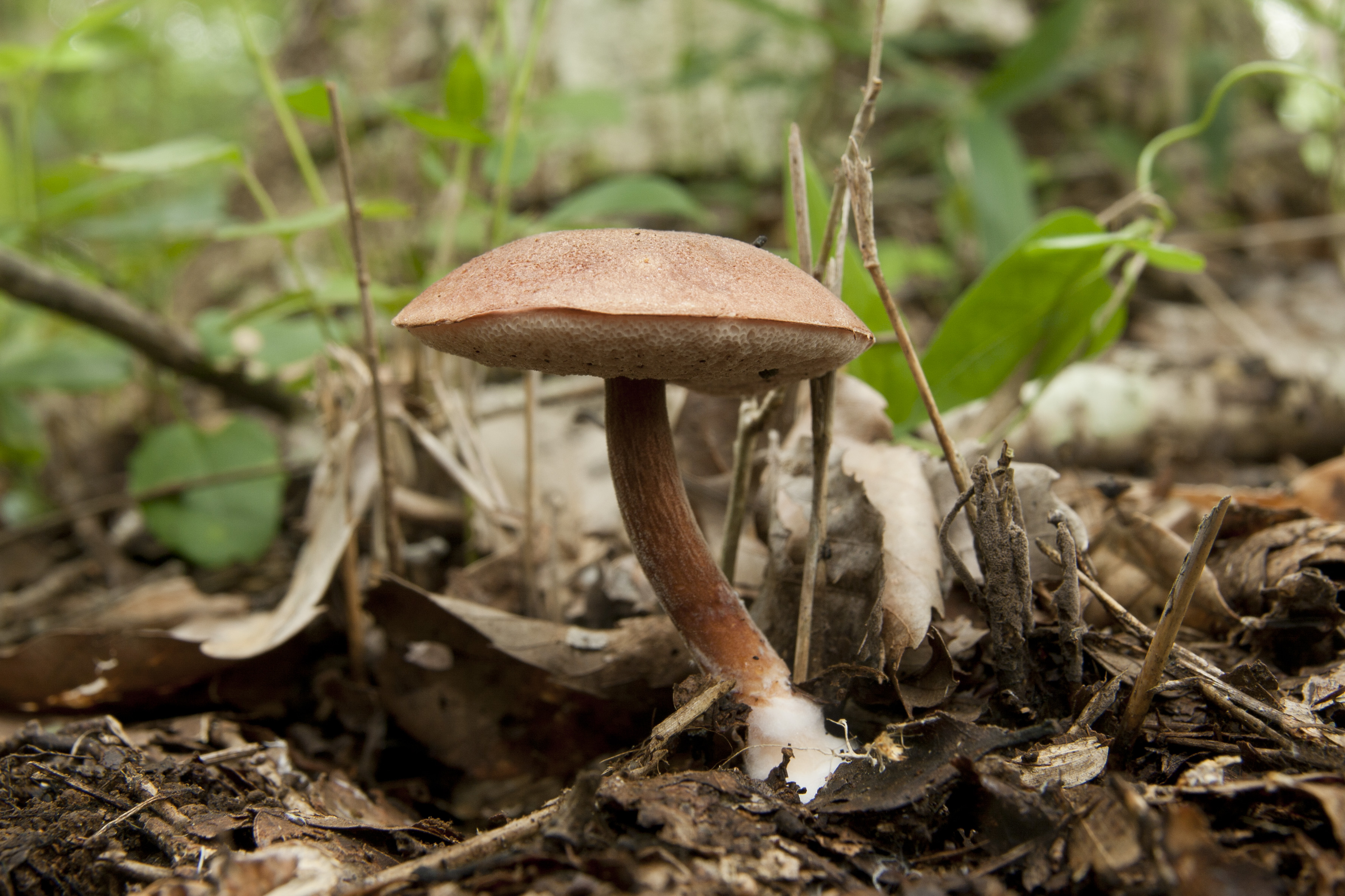 ヤシャイグチ属 クリカワヤシャイグチ (学名:Austroboletus gracilis)